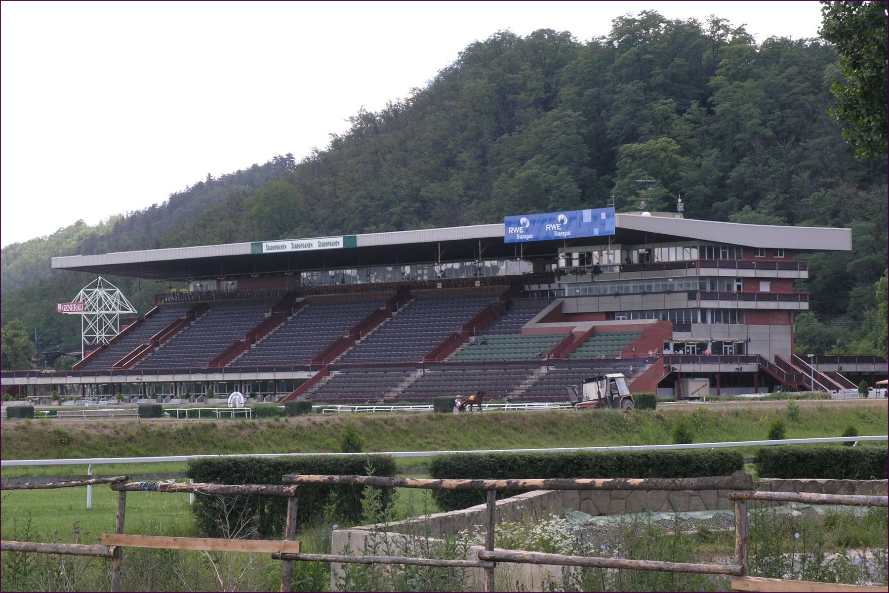 Praha, Velká Chuchle - tribuna na dostihovém závodišti